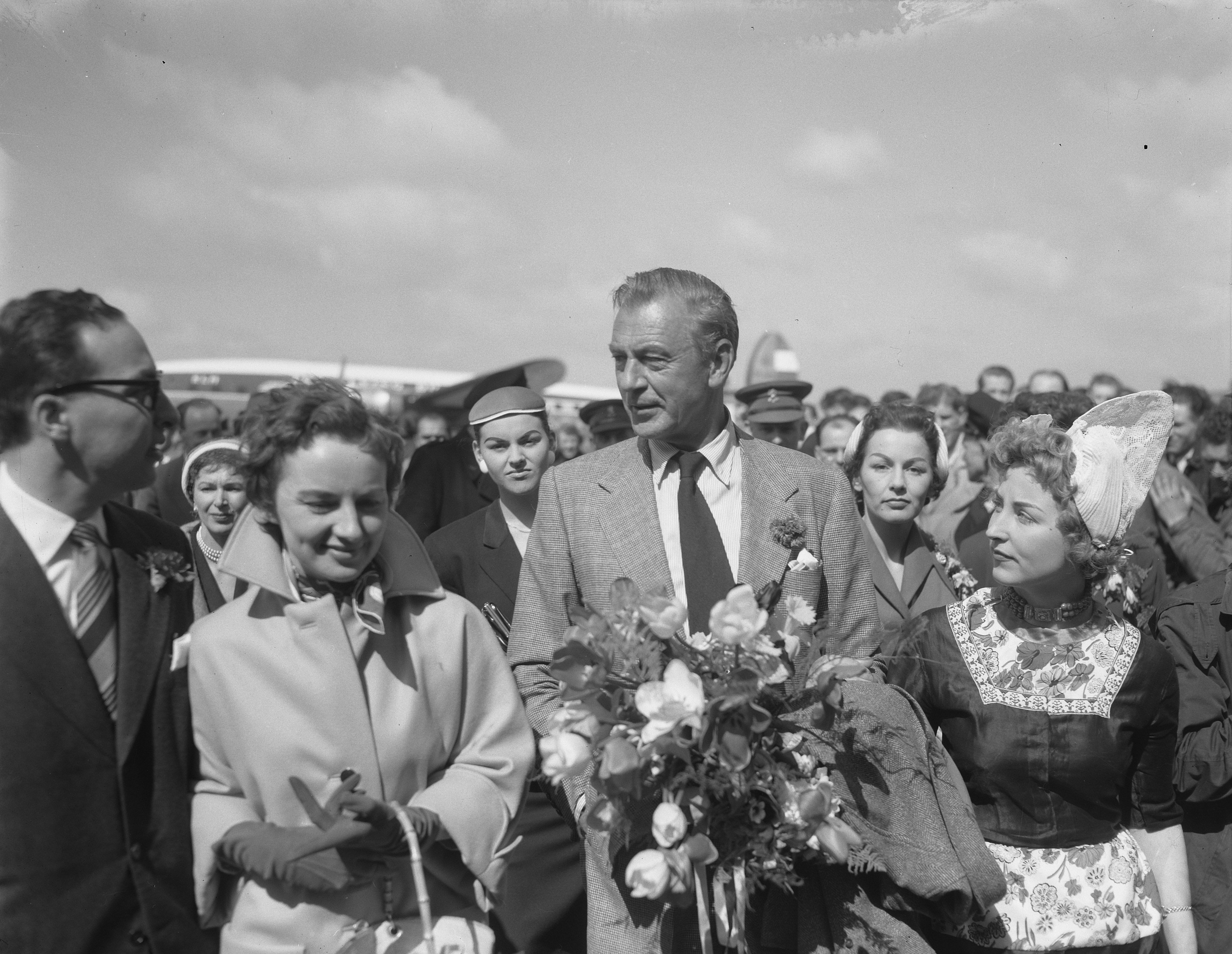 Collectie / Archief : Fotocollectie Anefo Reportage / Serie : [ onbekend ] Beschrijving : Aankomst filmacteur Gary Cooper op Schiphol Datum : 15 april 1955 Locatie : Noord-Holland, Schiphol Trefwoorden : aankomsten, acteurs, filmsterren, vliegvelden Persoonsnaam : Cooper, Gary Fotograaf : Noske, J.D. / Anefo Auteursrechthebbende : Nationaal Archief Materiaalsoort : Negatief (zwart/wit) Nummer archiefinventaris : bekijk toegang 2.24.01.04 Bestanddeelnummer : 907-0727